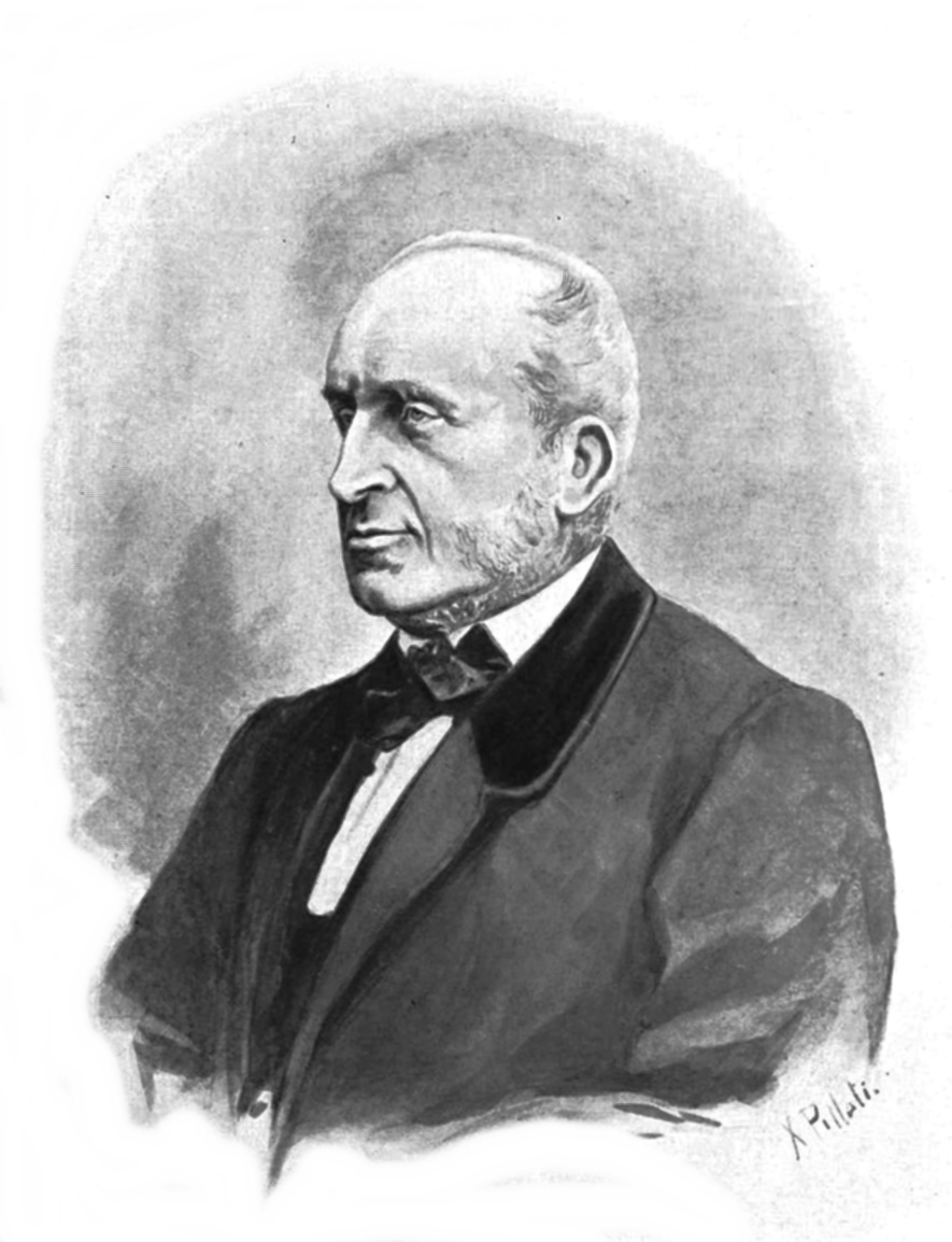 grafika z książki PL - Album biograficzne zasłużonych Polaków wieku XIX t.1 publikacja Marii Chełmońskiej Warszawa 1901